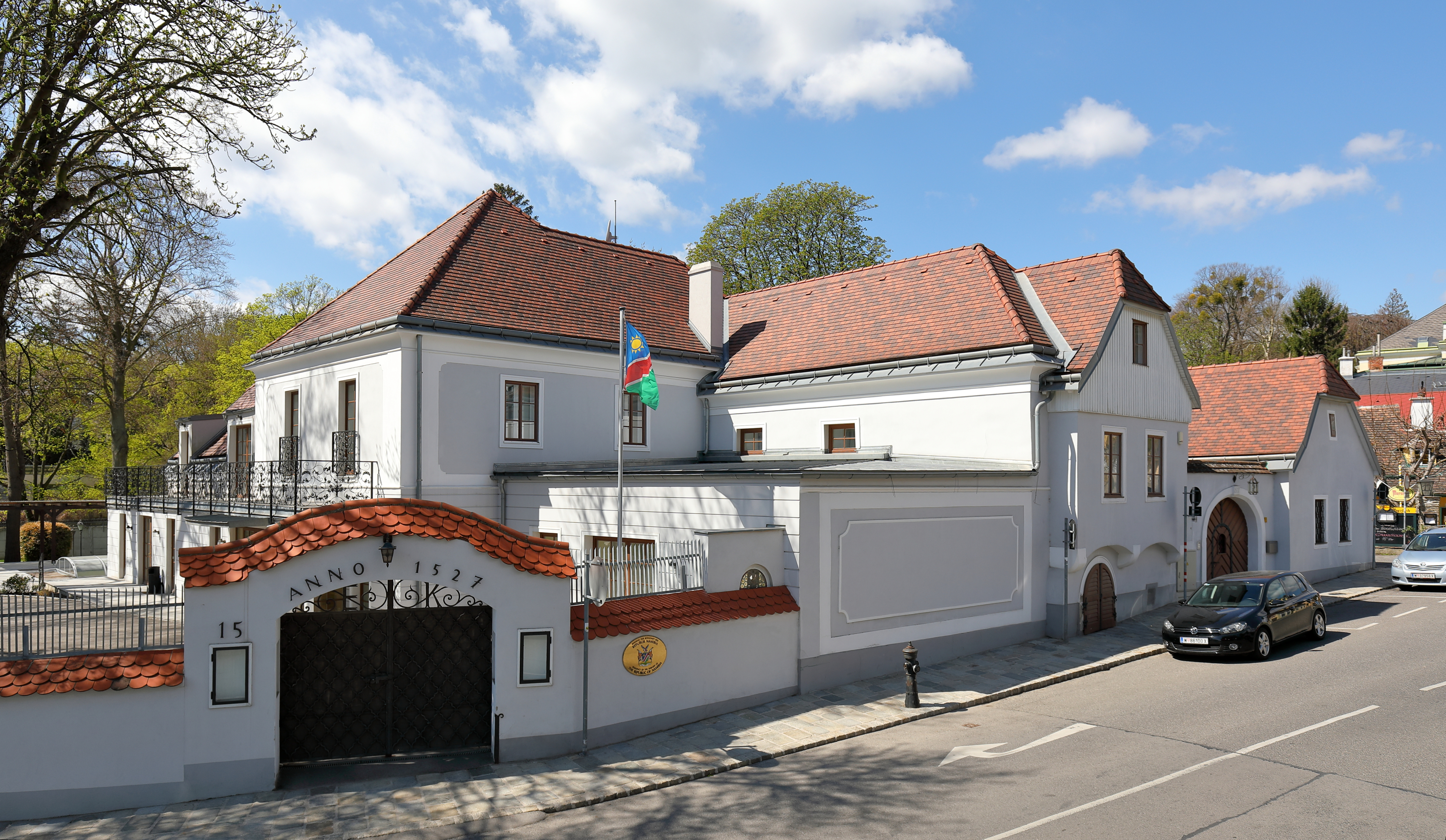 Das ehemalige „Alte Preßhaus“ am Peter-Alexander-Platz 1 (ehemals Cobenzlgasse Nr. 15), Ecke Feilergasse 1, in Grinzing, ein Bezirksteil des 19. Wiener Gemeindebezirkes Döbling. Der Winzerhof bzw. das Presshaus stammt im Kern aus dem 16. Jahrhundert, wobei im 18. Jahrhundert und in der Folge Umbauten erfolgte. Um 2007 wurde der Heurigenbetrieb eingestellt und um 2010 kaufte der Staat Namibia das Areal und baute es um bzw. sanierte es zu einer „standesgemäßen“ Botschafter-Residenz. 2012 wurde der Platz vor dem Haus in Peter-Alexander-Platz umbenannt, daher ist die korrekte Adressangabe Peter-Alexander-Platz 1 und nicht mehr Cobenzlgasse Nr. 15.